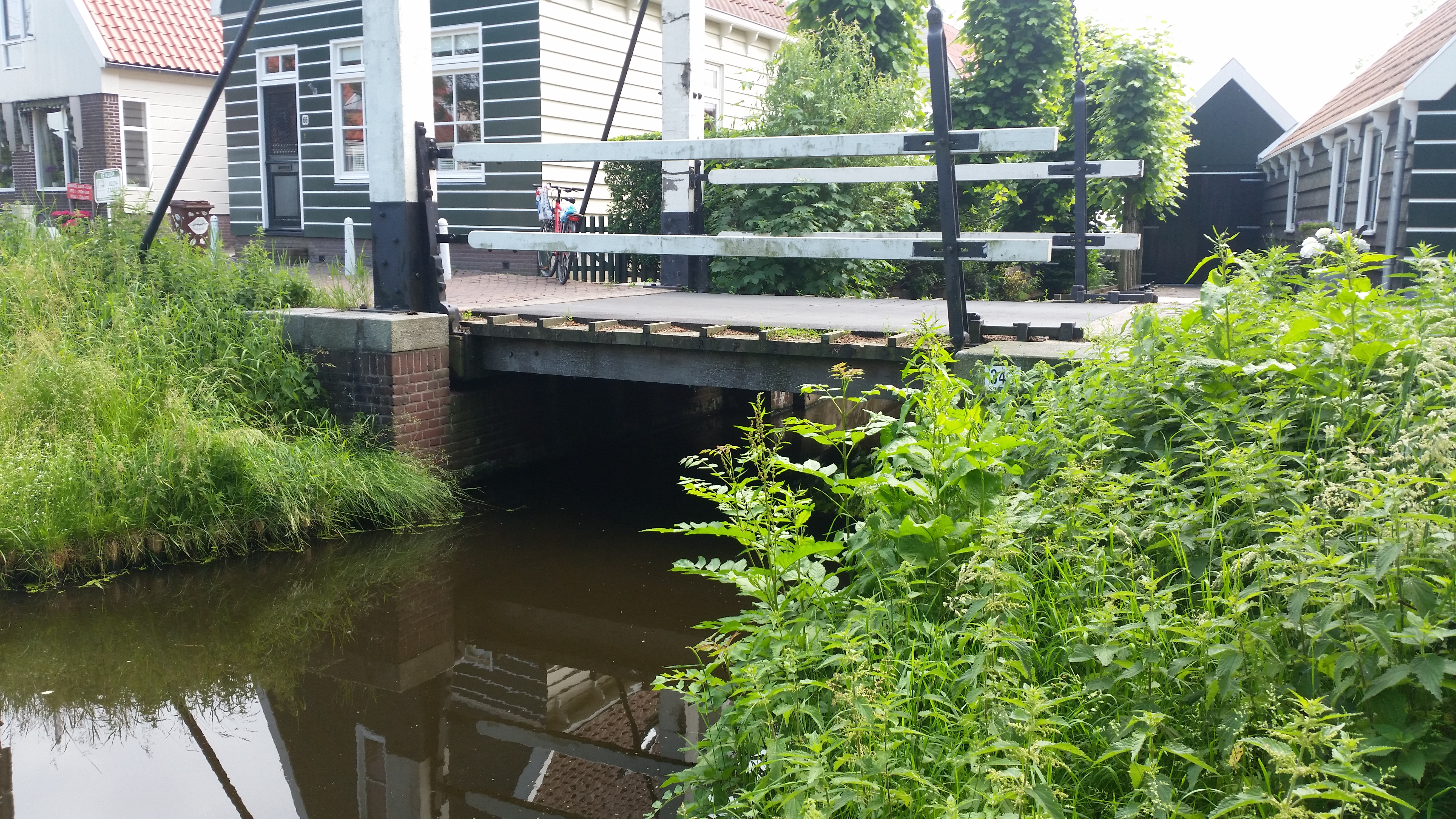 Brug 343, overspanning